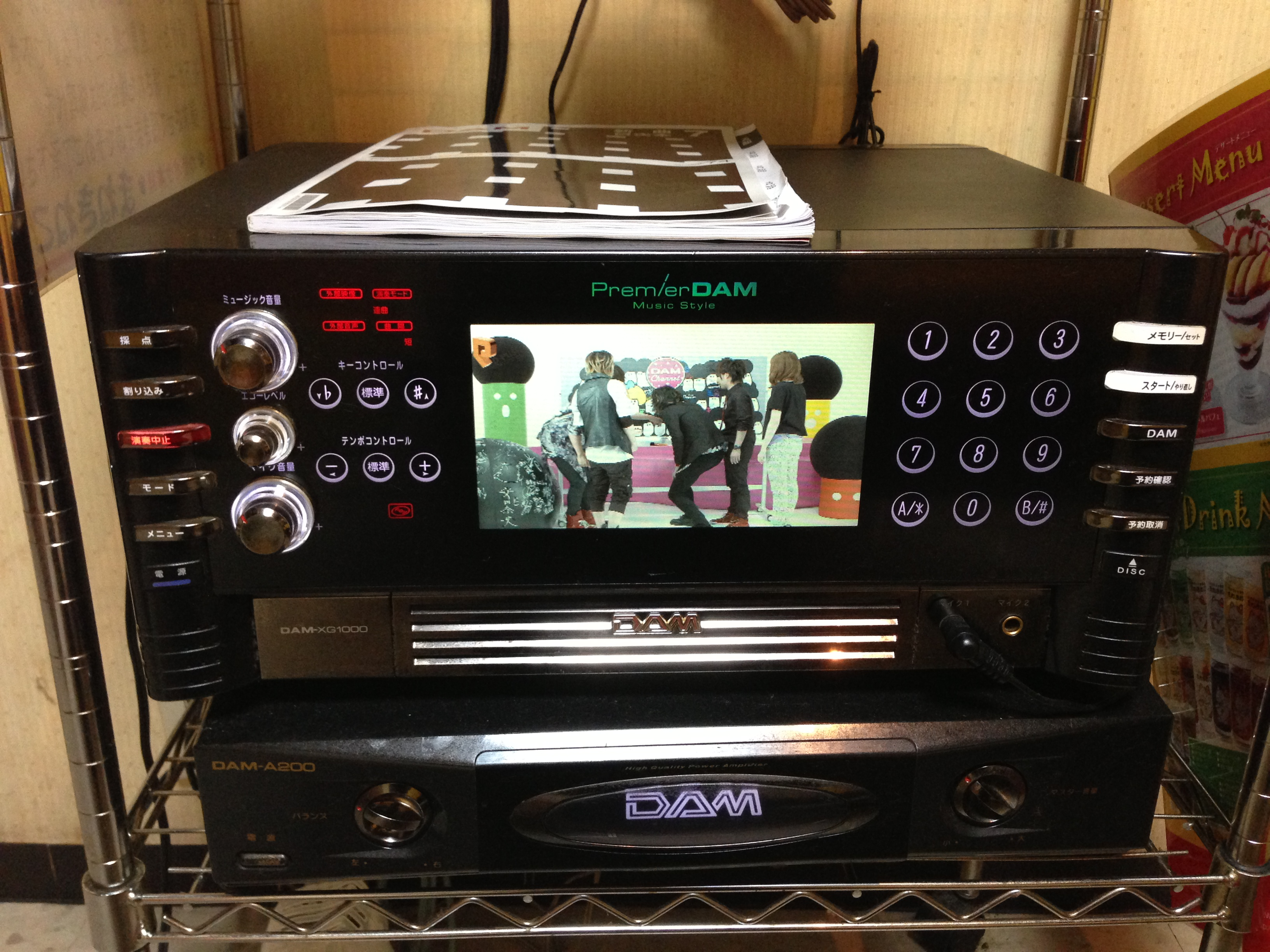 PremierDAM XG1000